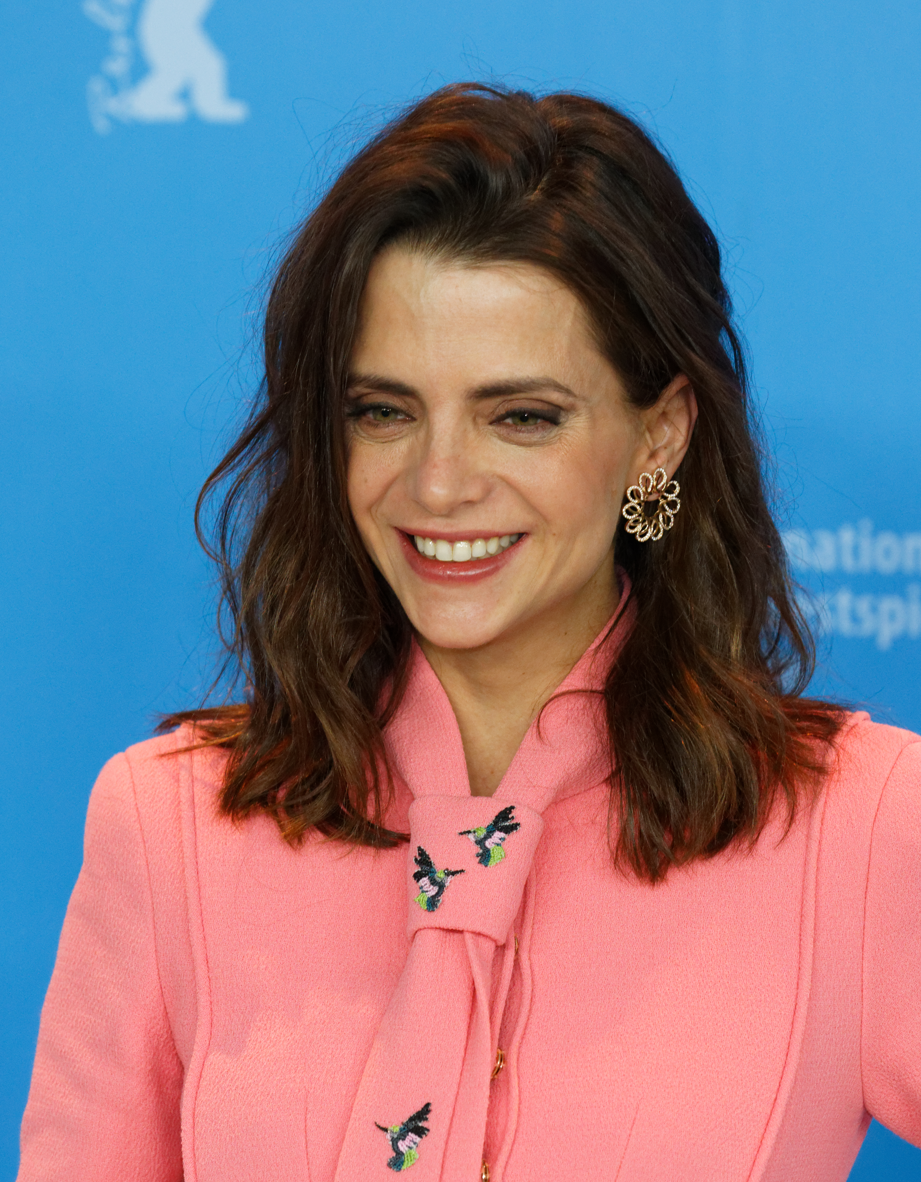 Macarena Gómez beim Photo Call zu Skin bei der Berlinale 2017